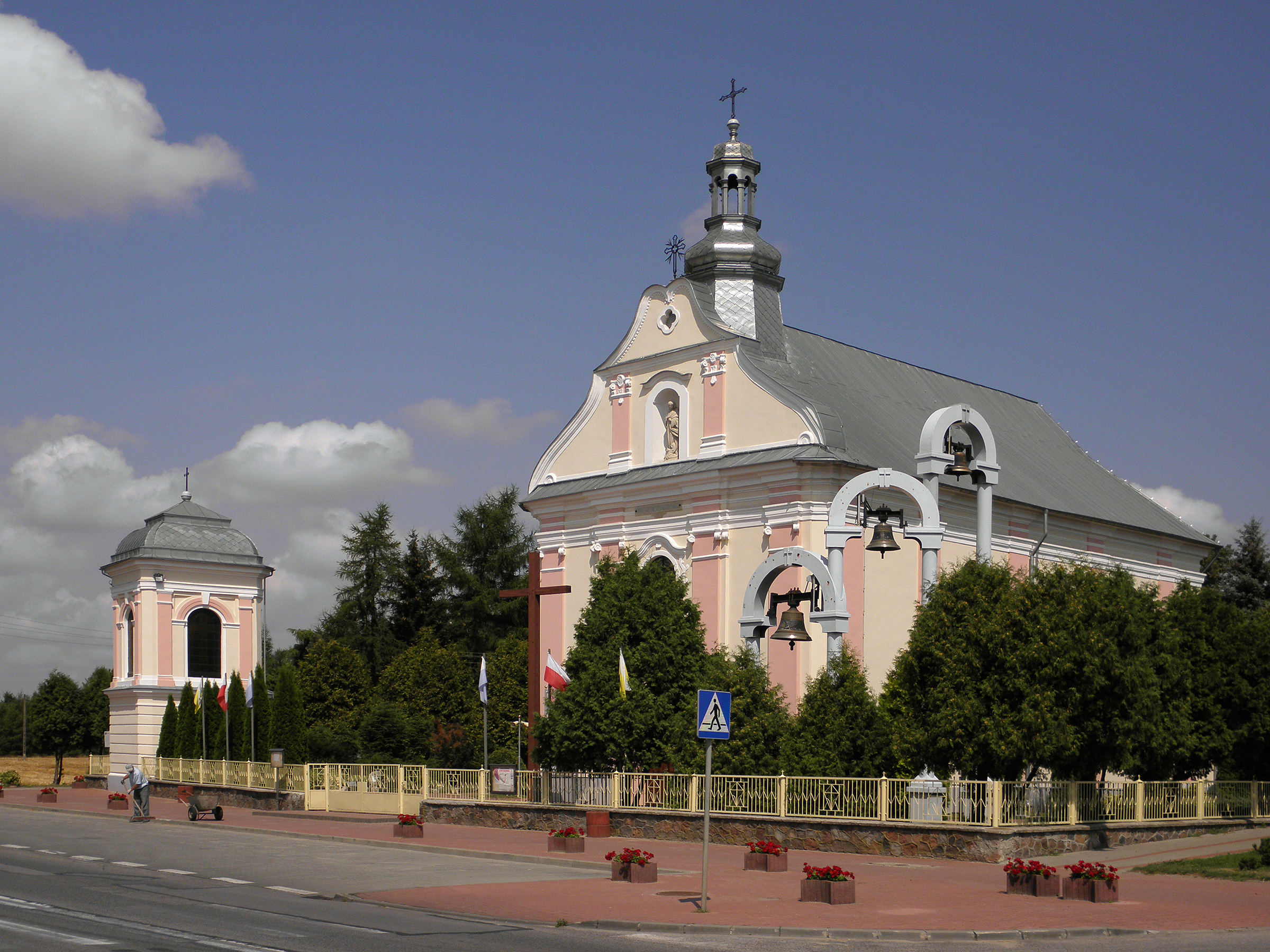 Zakrzew - kościół parafialny pw. św. Jana Chrzciciela (zabytek nr A-768)